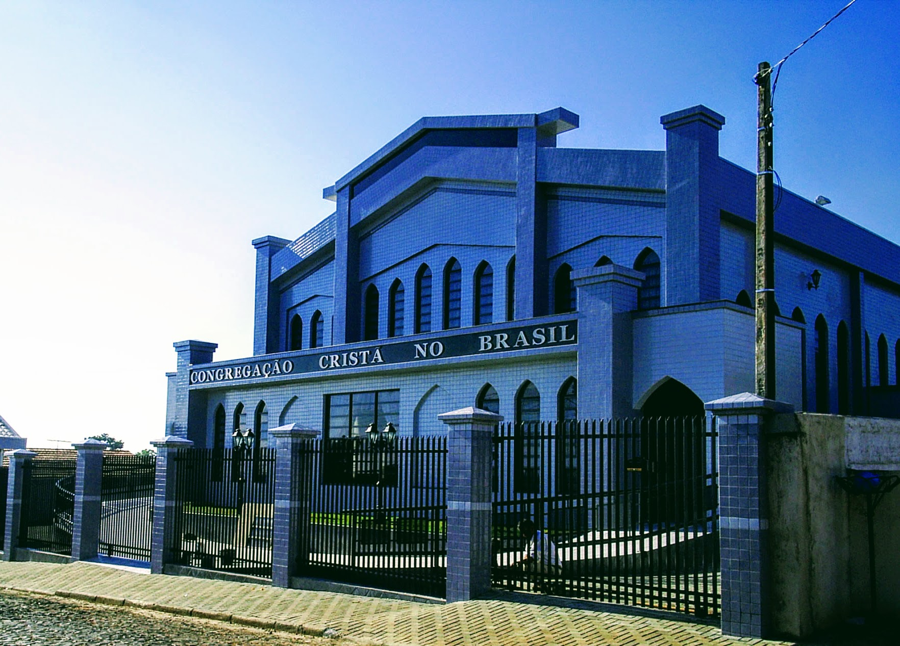 Congregação Cristã no Brasil, Central de Curiúva, no Paraná.